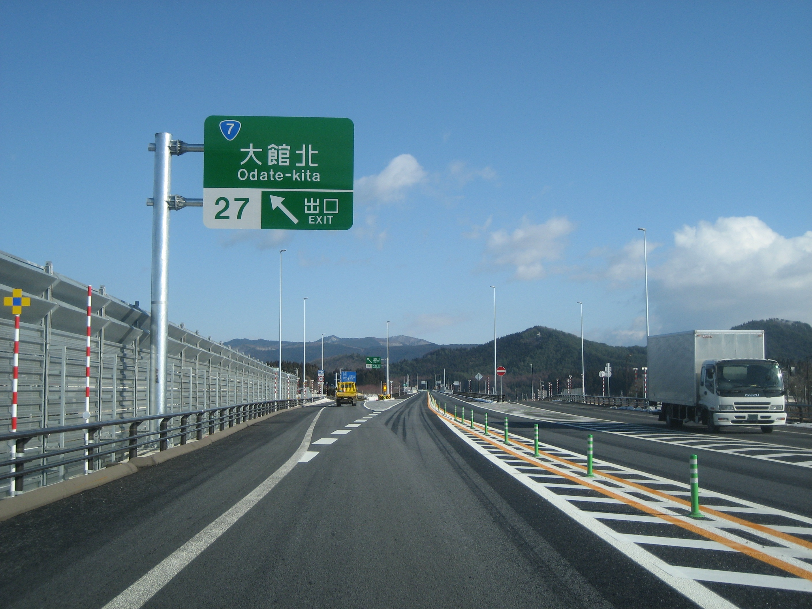 秋田自動車道大館北IC（小坂JCT方面を撮影）